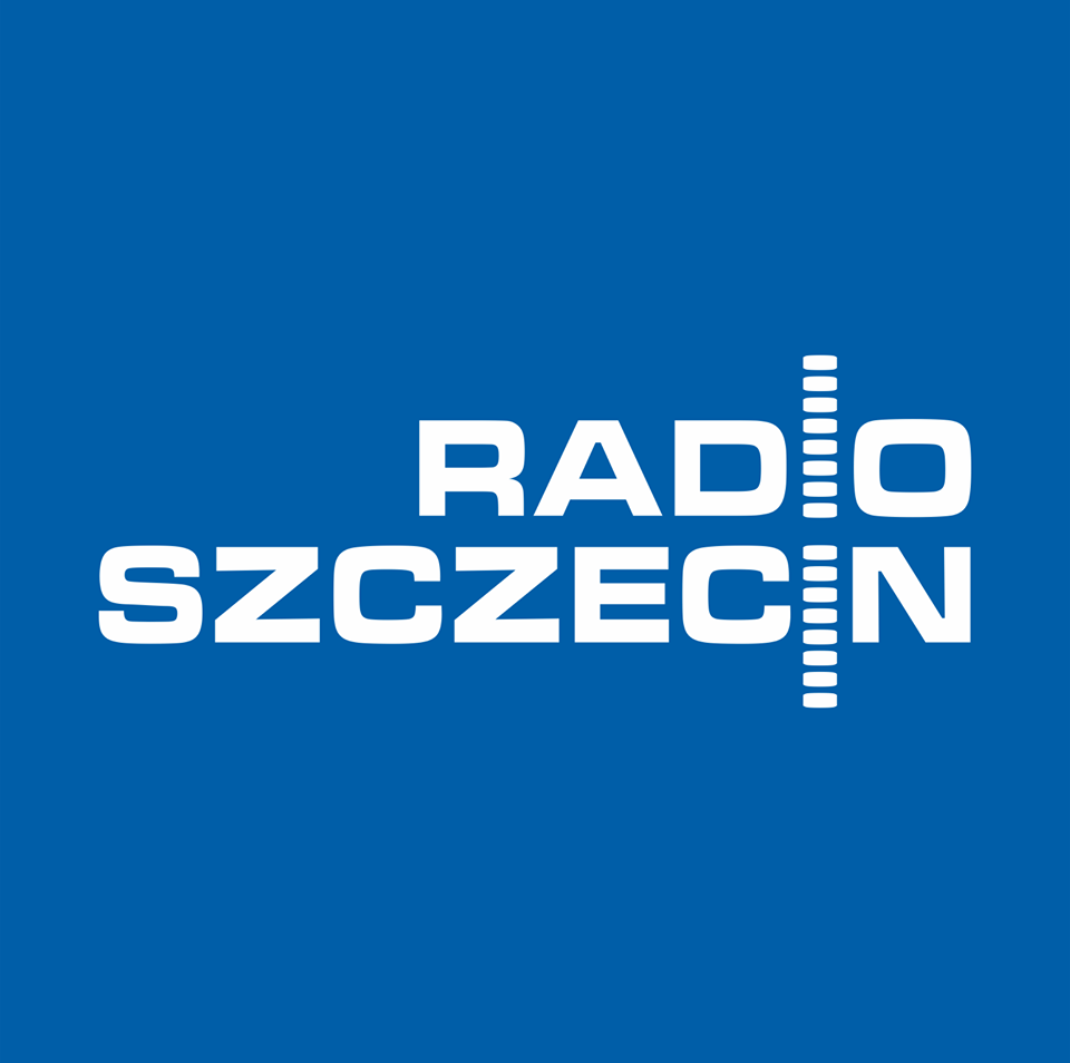 Logo Radio Szczecin